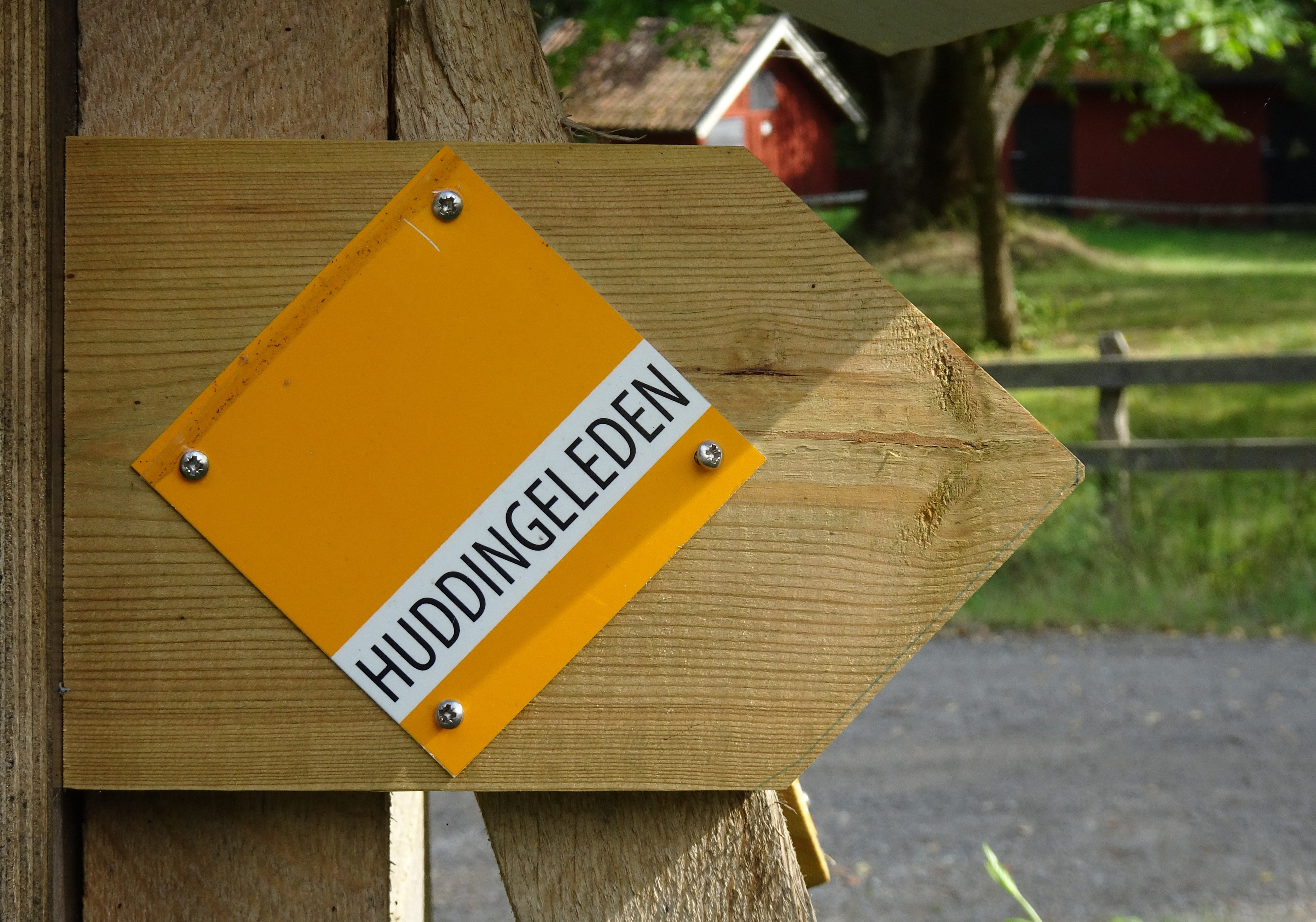 Huddingeleden skylt vid Gladö kvarn